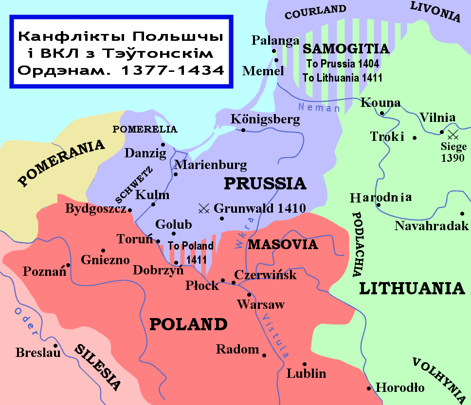 Беларуская (тарашкевіца): Канфлікты Польшчы і Літвы з Тэўтонскім Ордэнам. 1377-1434